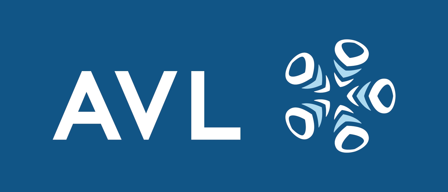 AVL Logo